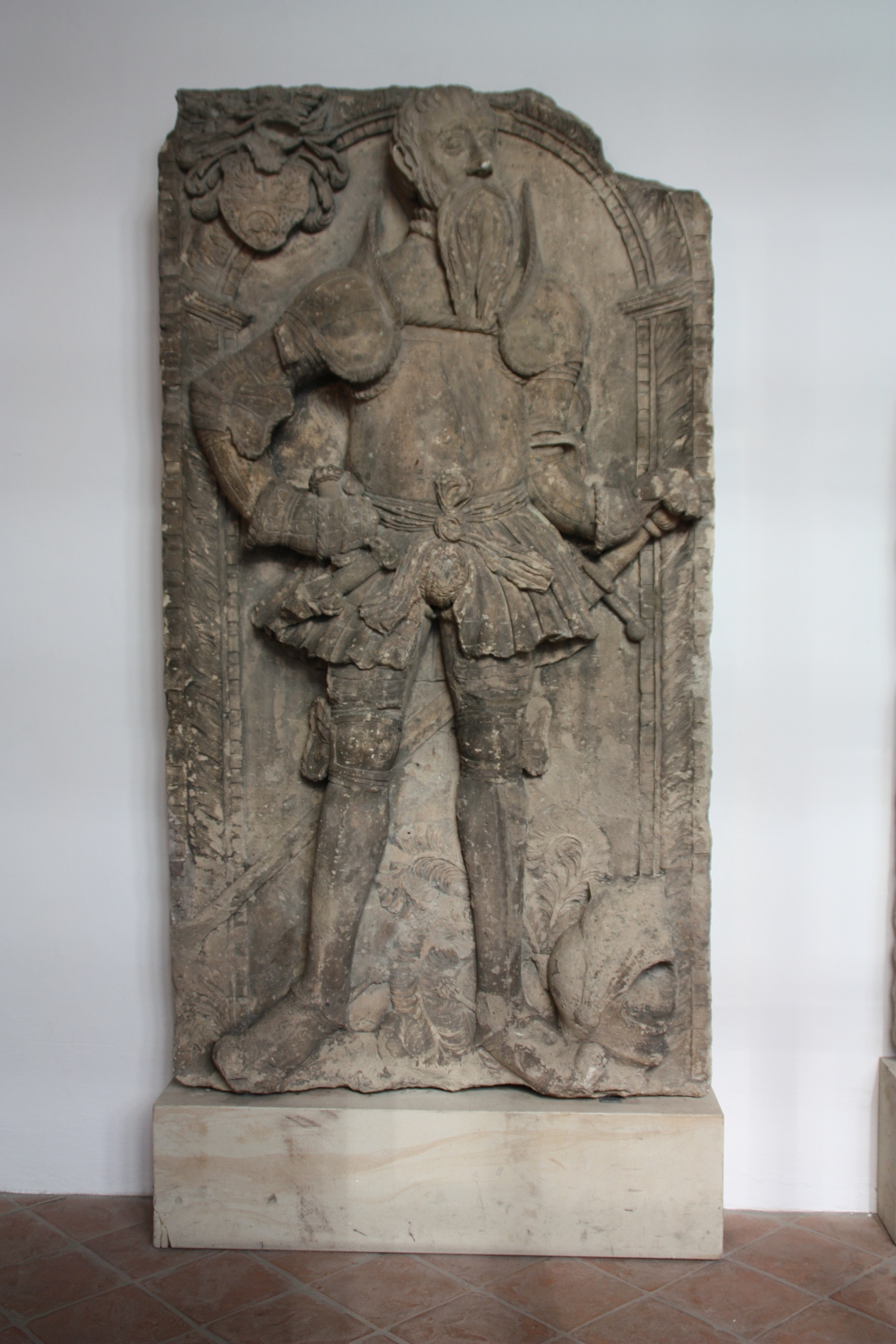 Chemnitz, Schloßbergmuseum. Epitaphplatte des Hauptmanns Peter Pfefferkorn.